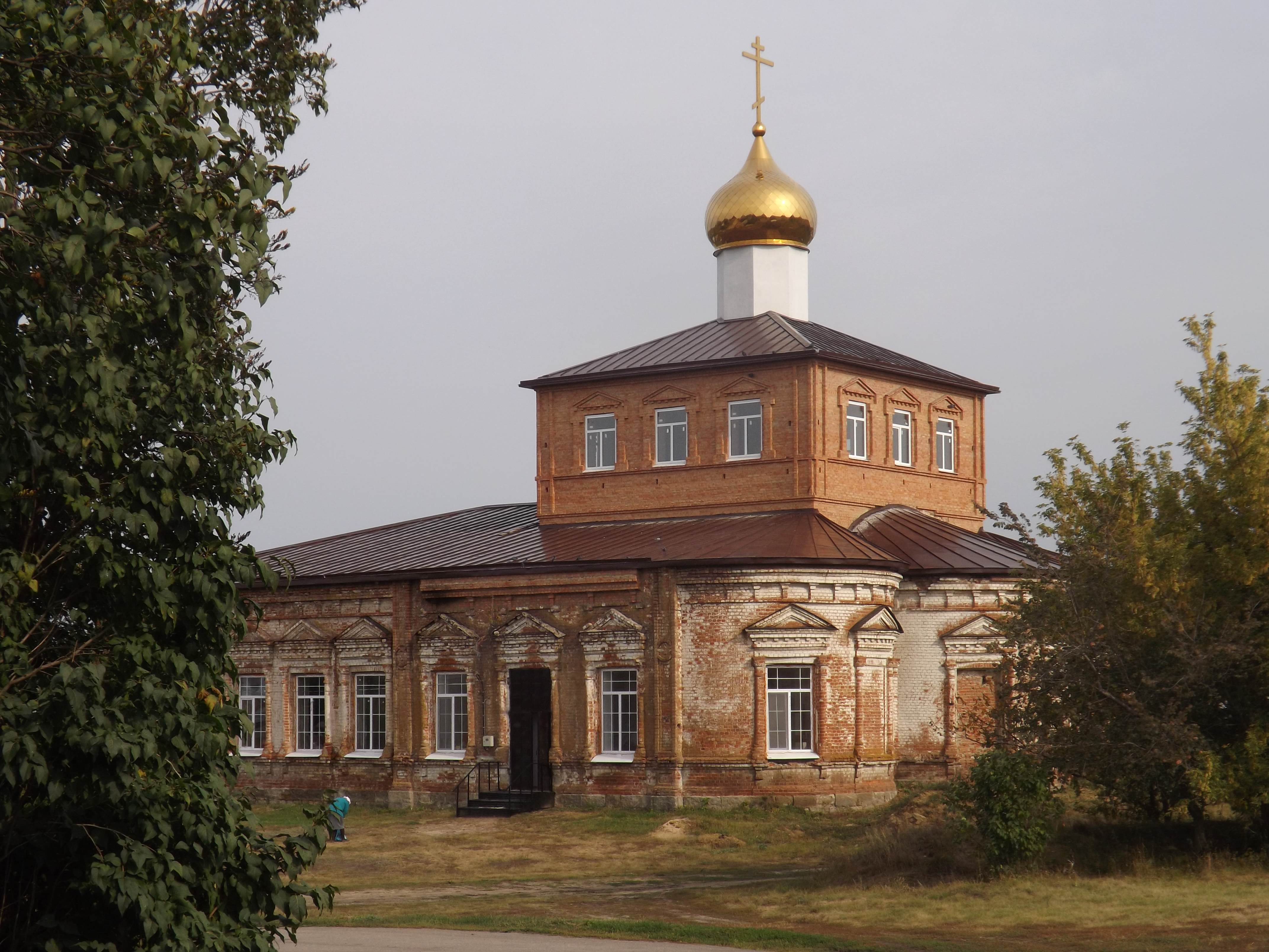 Церковь Казанской иконы Божьей Матери: Сластуха, Екатериновский район, Саратовская область